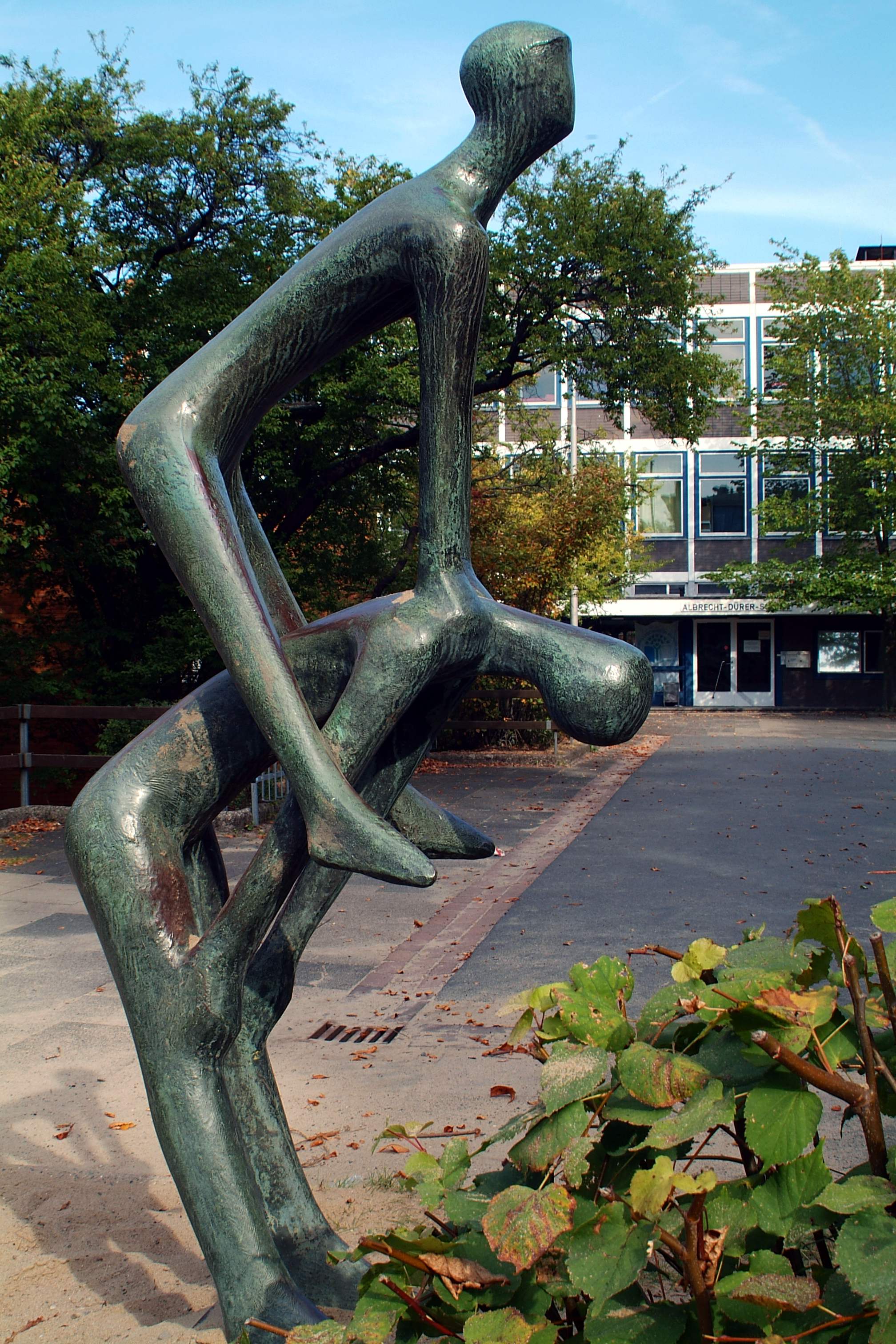 Die Plastik/Skulptur Bockspringen von Ewald Brandt, 1959 von Haberland gegossen und auf dem Schulhof der Grundschule/Volksschule (heute: Albert-Dürer-Schule) in Hannover aufgestellt.